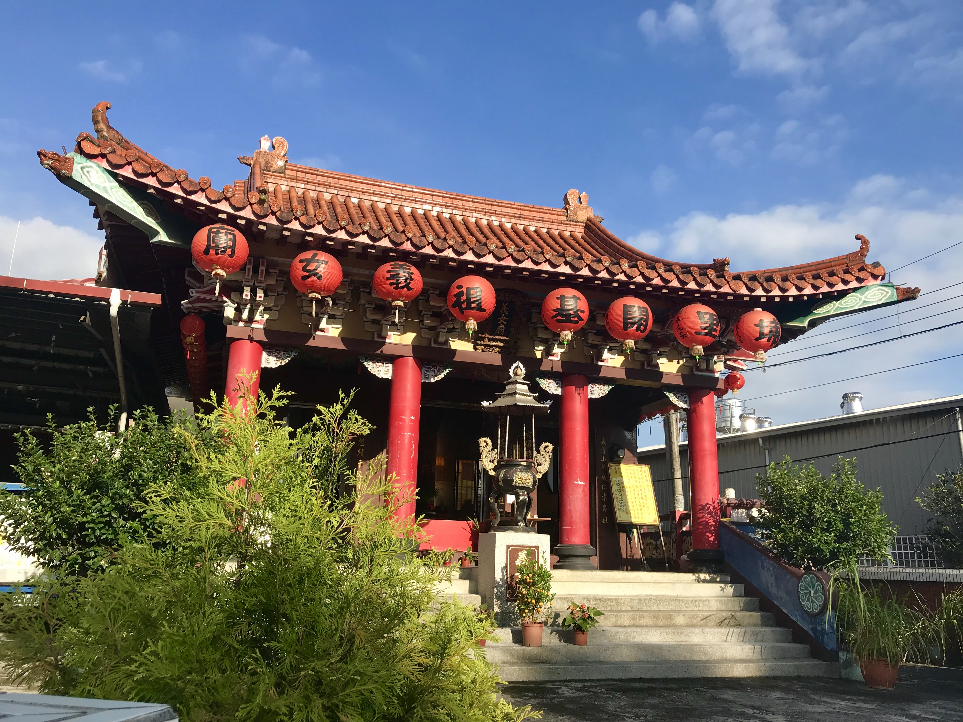 義女廟斜照